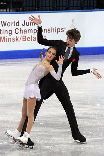 Бьянка Манакорда и Никколо Мачии (Италия) на чемпионате мира по фигурному катанию среди юниоров 2012